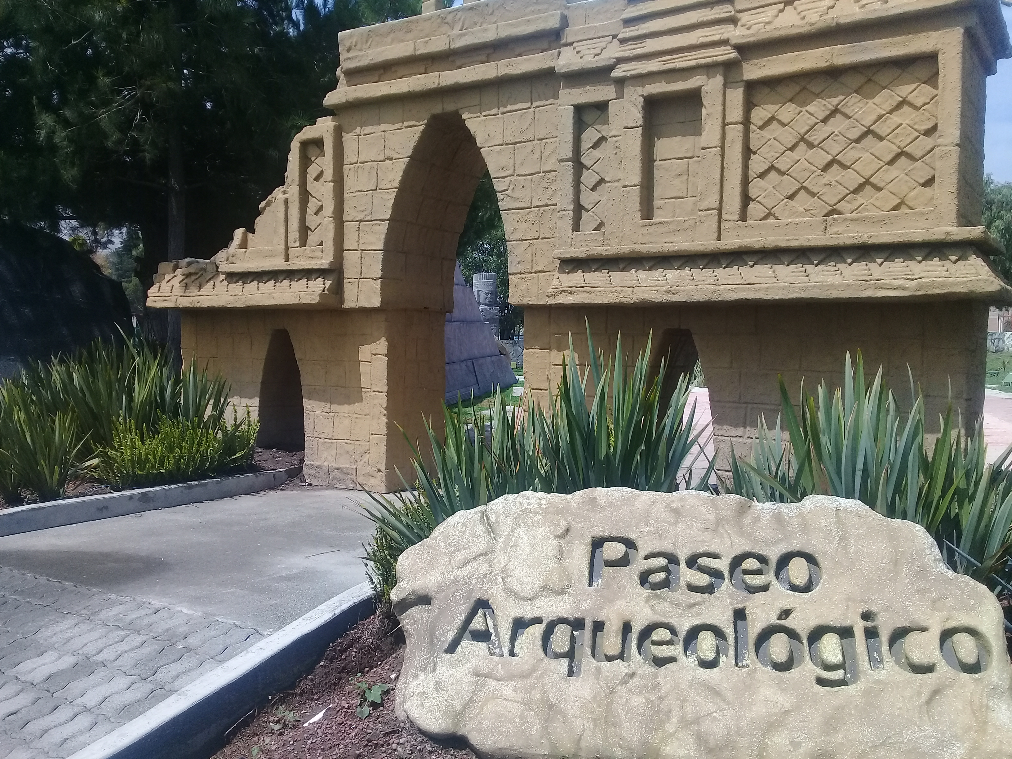 El Paseo Arqueológico fue inaugurado en el año 2000 cuenta con 53 piezas, réplicas representativas de la cultura mesoamericana. Más de 50 réplicas representativas de 10 culturas mesoamericanas componen esta área, en la que se puede hacer un recorrido de varios minutos conociendo más de cada pieza y las principales culturas precolombinas que se asentaron en el territorio mexicano.